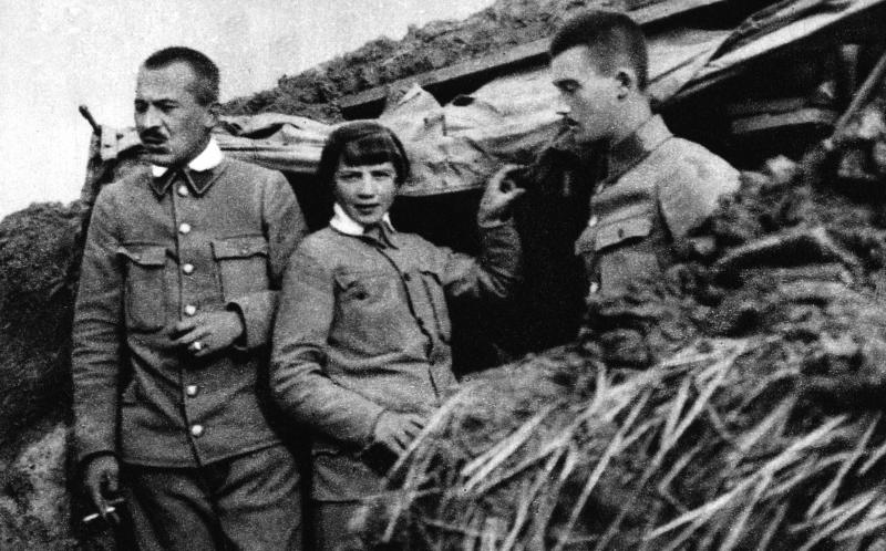 Legiony Polskie - okopy 3 pułku piechoty. Ppor. Walerian Czuma, sanitariuszka Olga Gnatowicz, chor, Józef Jaklicz. Besarabia, rok 1915.